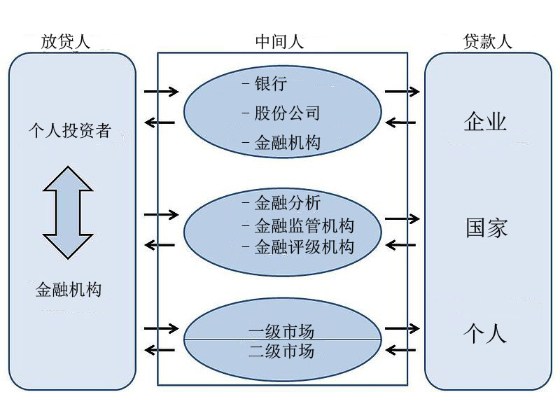 资本市场的参与者